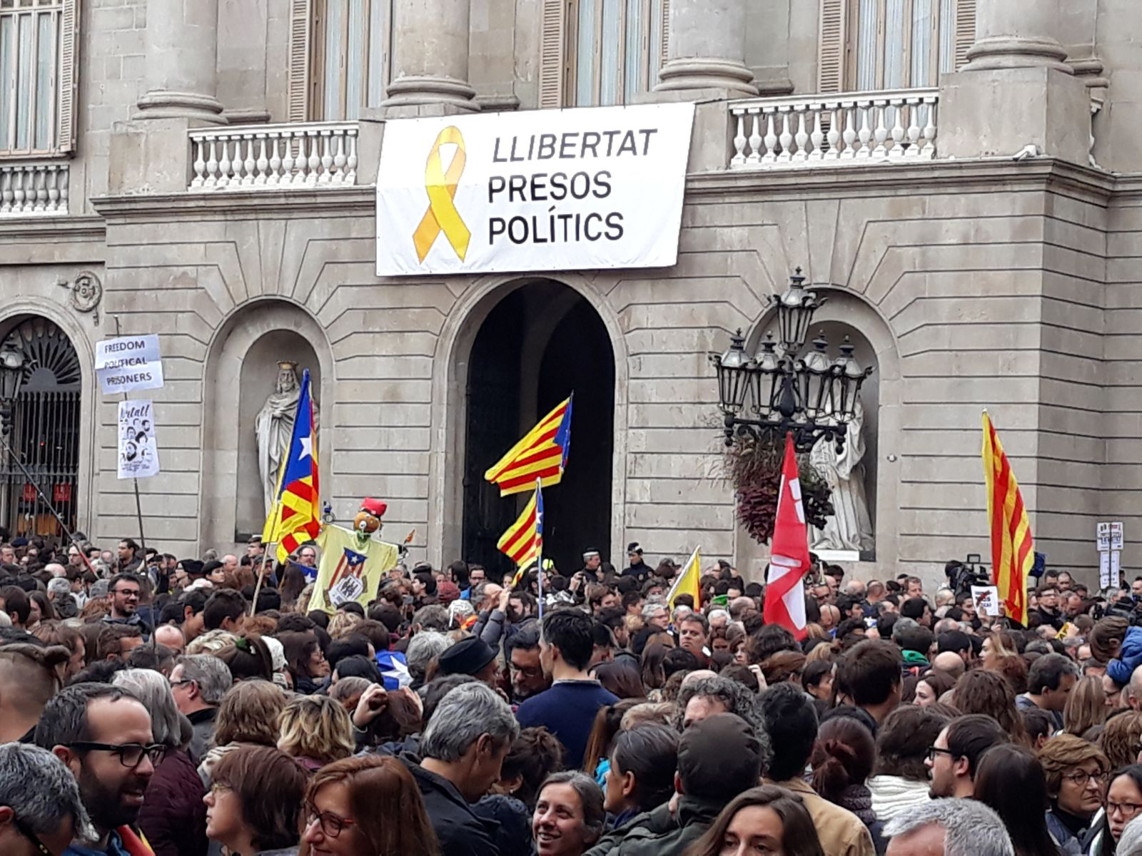 Concentració a la pl. Sant Jaume.